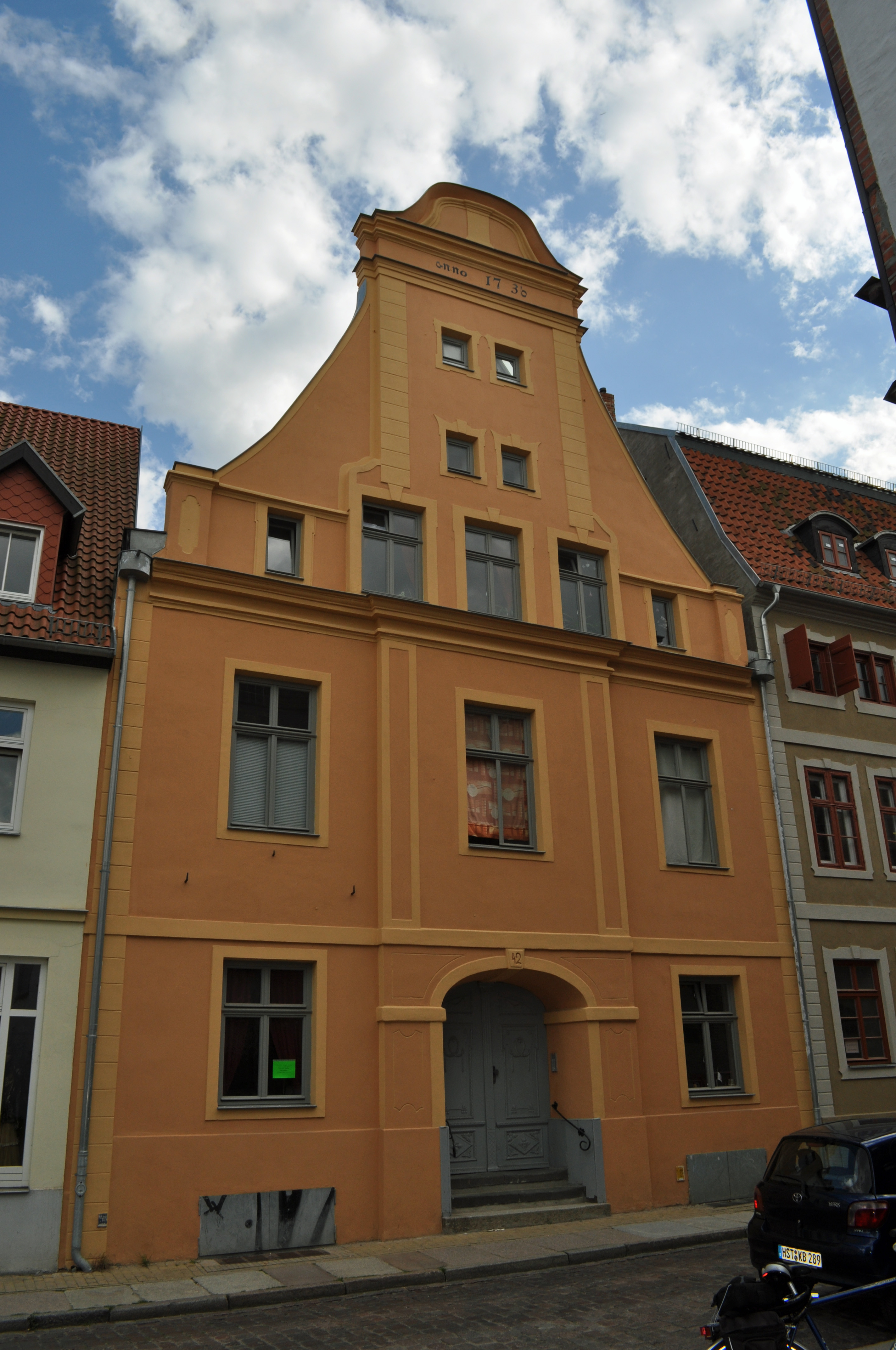 Das Foto zeigt ein Haus (bzw. Details des Hauses) in der Frankenstraße in Stralsund, Deutschland. Die Hausnummer steht im Dateinamen. Aufgenommen am 19. Juli 2011 vom Benutzer:Klugschnacker.